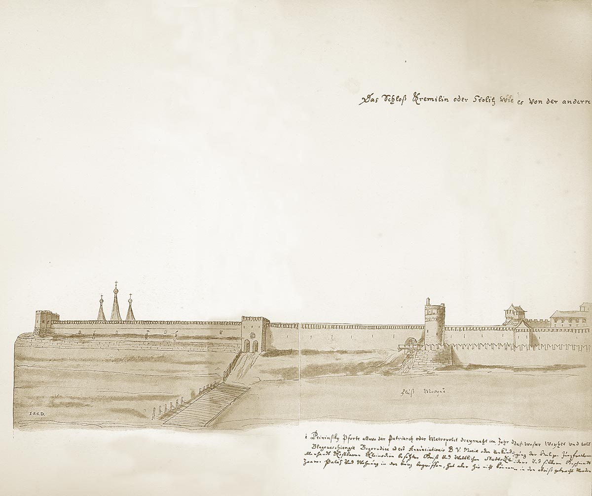 Кремль с запада